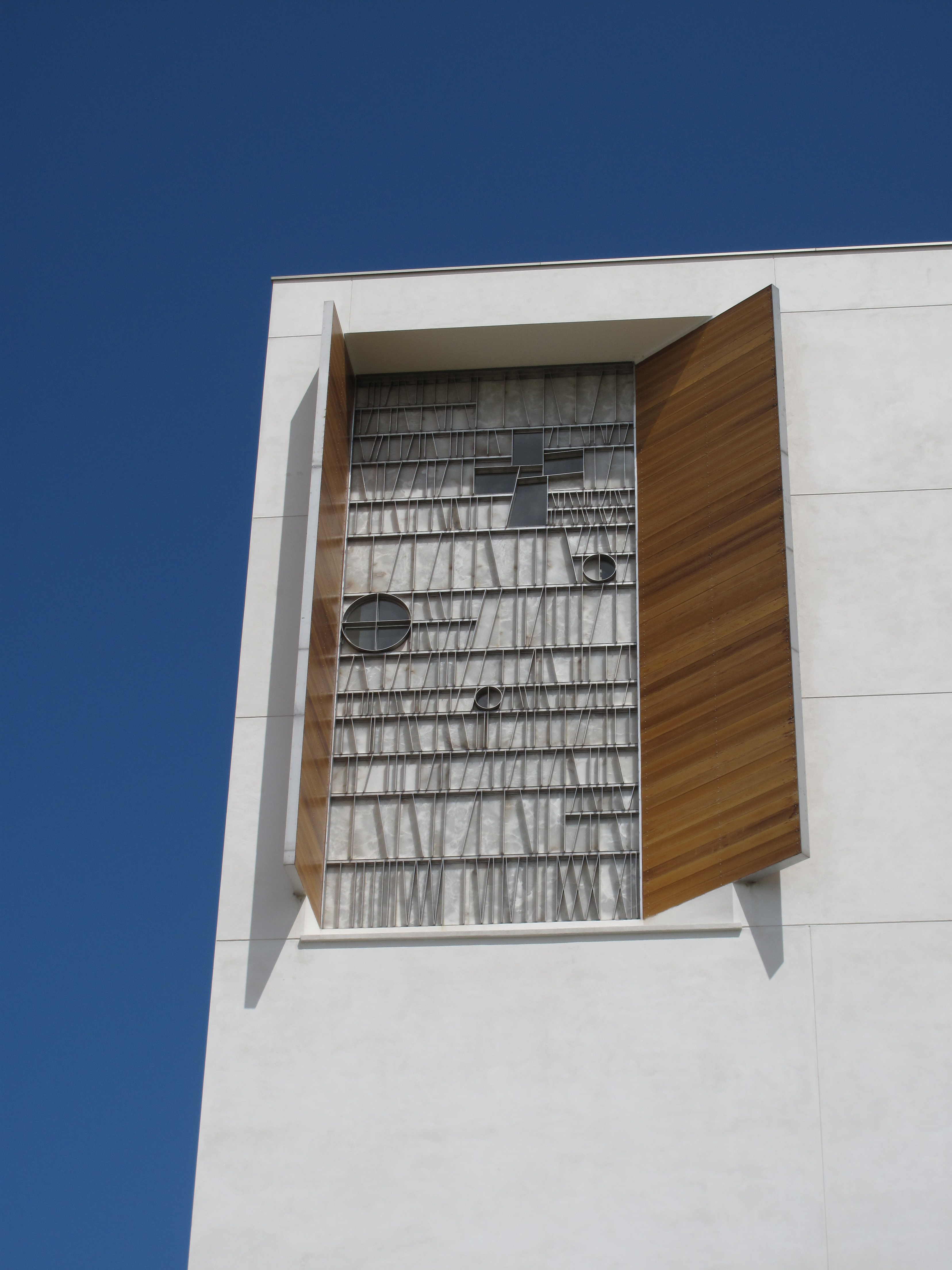 Iglesia de Iesu en Donostia. Obra de Rafael Moneo en 2011.